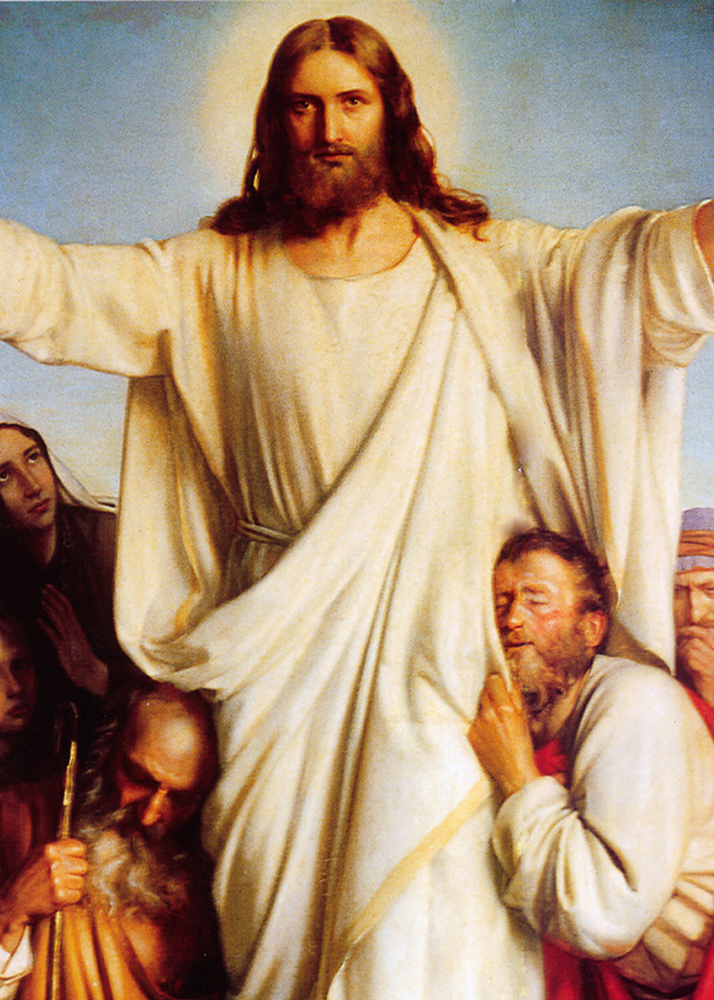 Consolator.